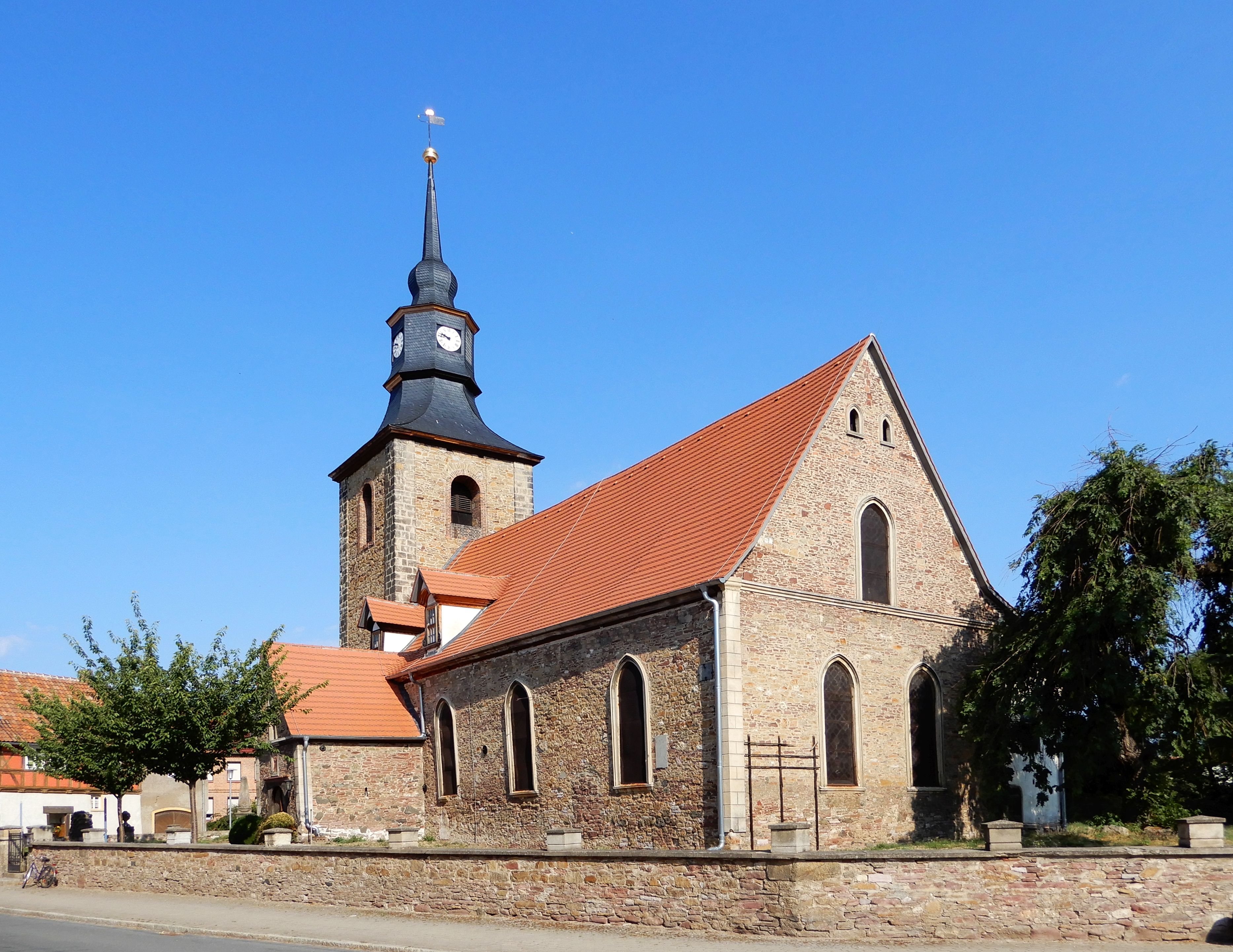 Blick auf die Dorfkirche in Meisdorf